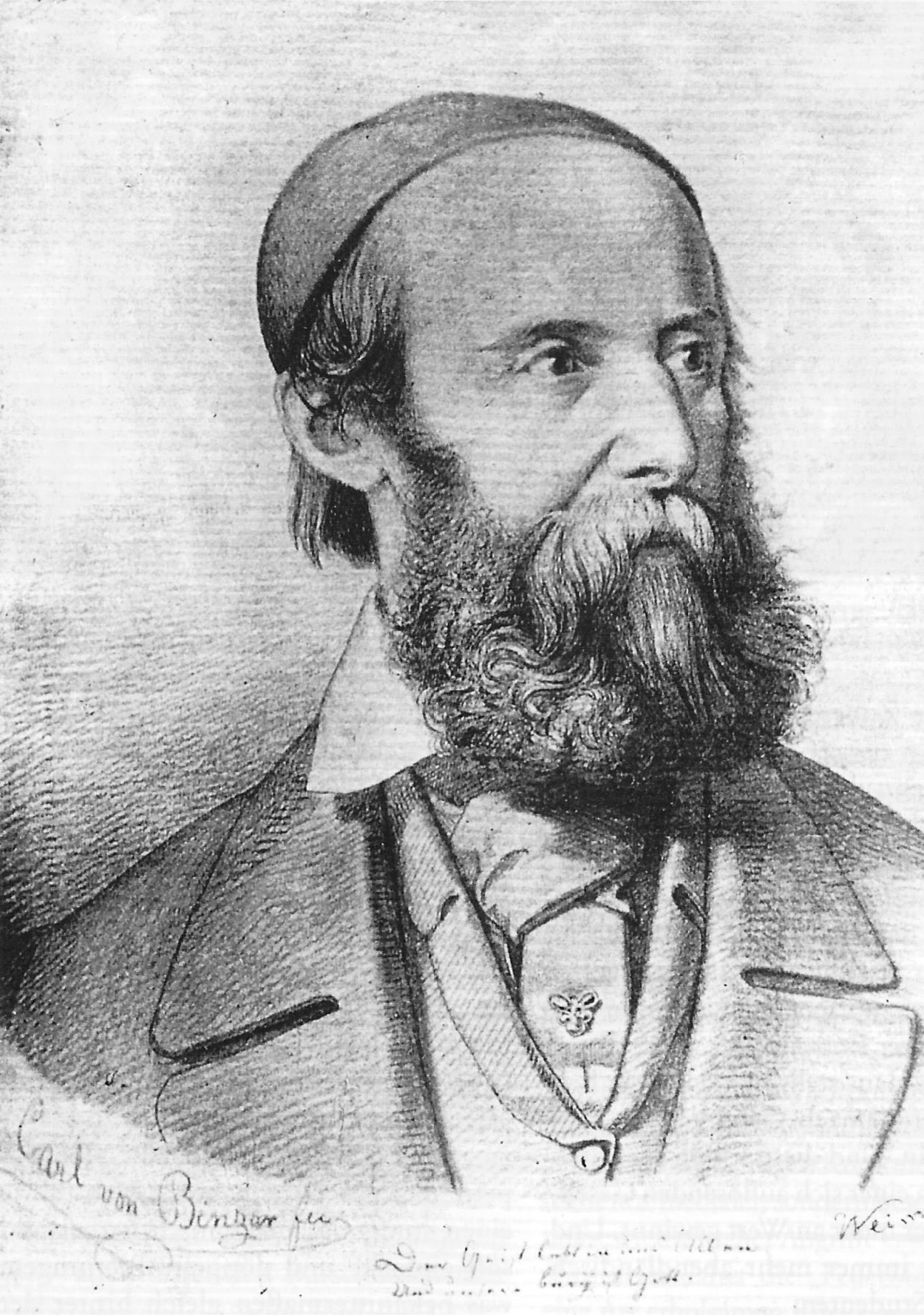 August Daniel Freiherr von Binzer (1793–1868) nach einer Zeichnung seines Sohnes, des Kunstmalers Carl Freiherr von Binzer (1824–1902)